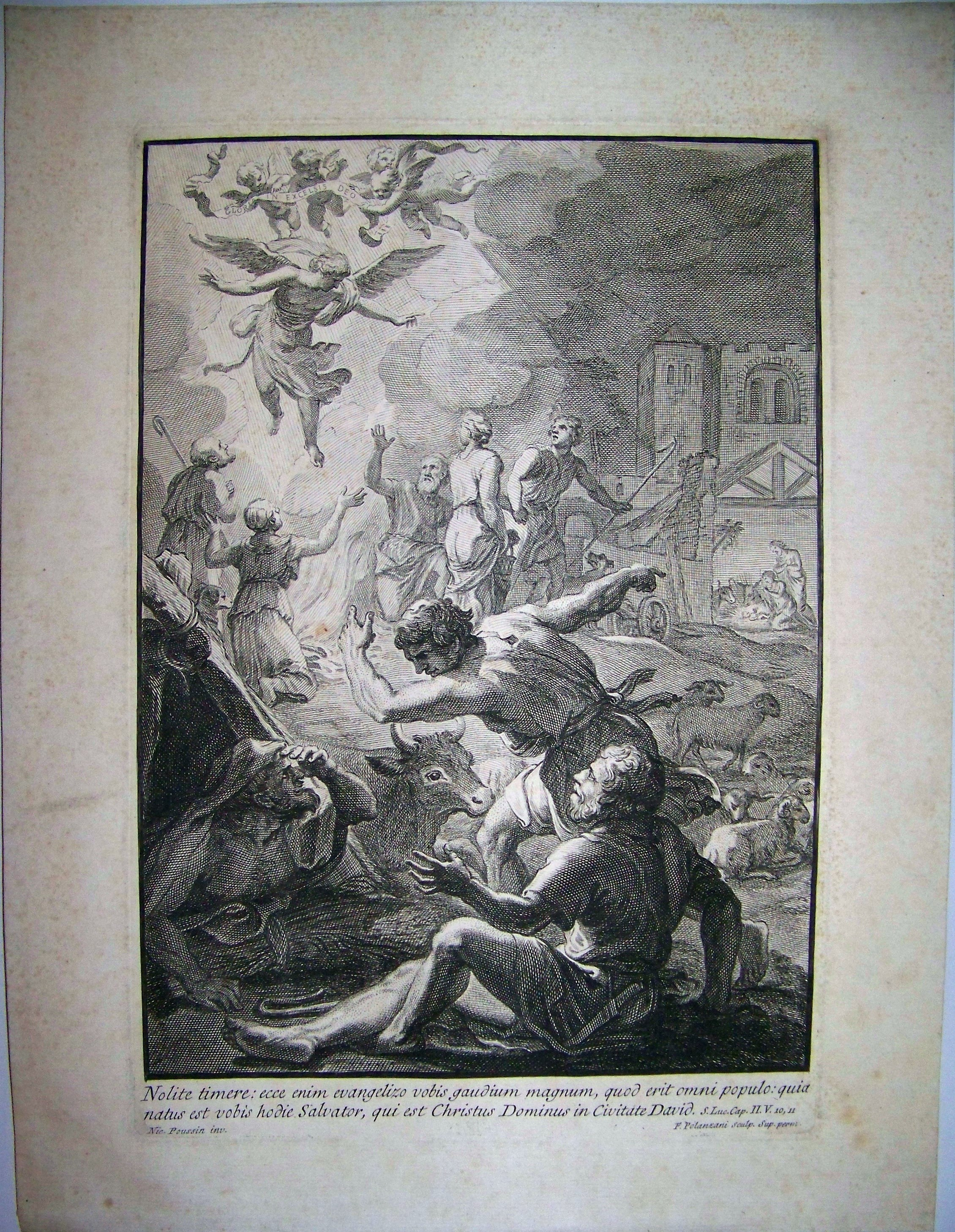 L'annonce aux Bergers - Evangile selon Saint Luc (Ch 2)